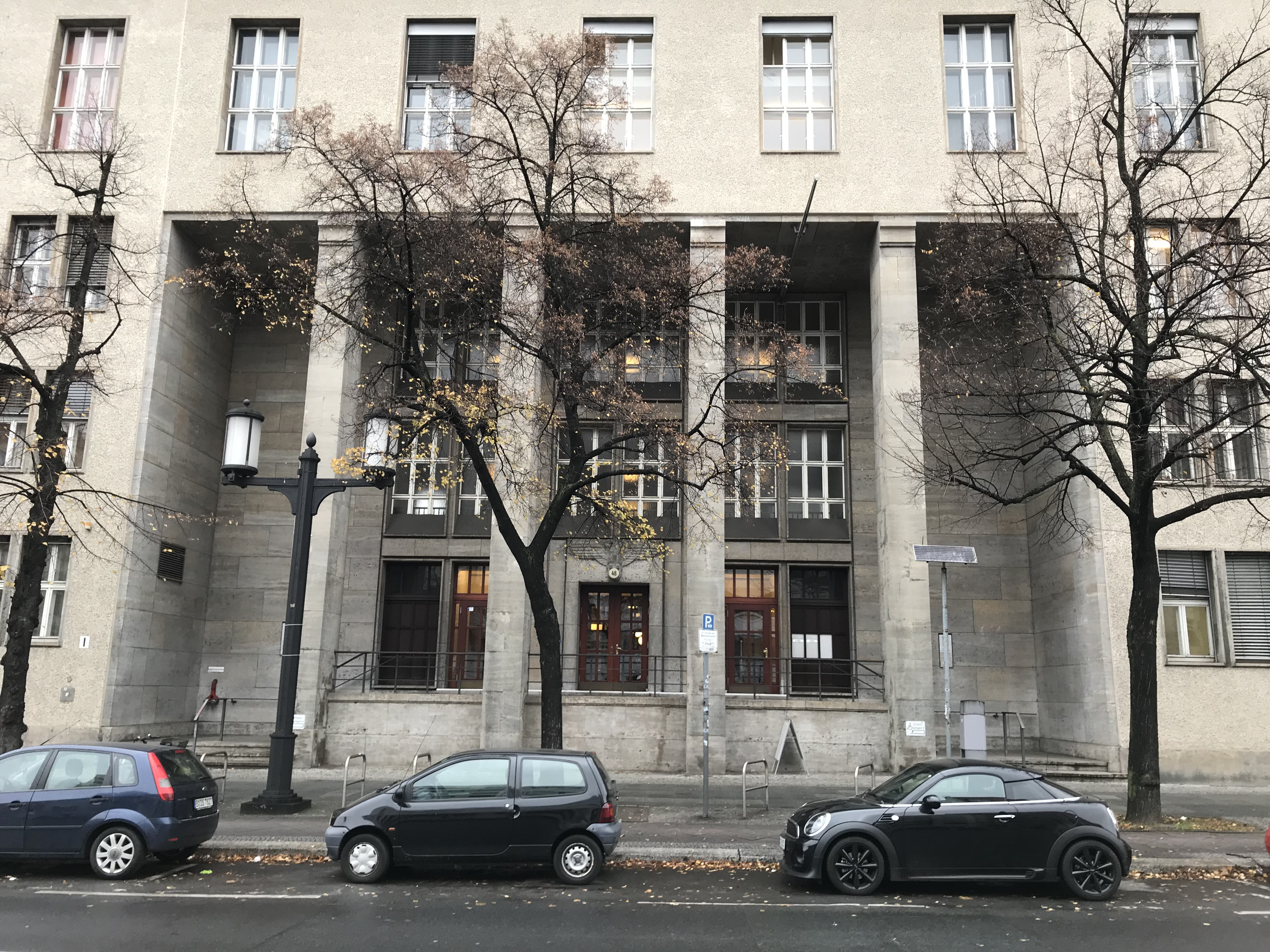 Eingangsportals des Finanzamts Charlottenburg